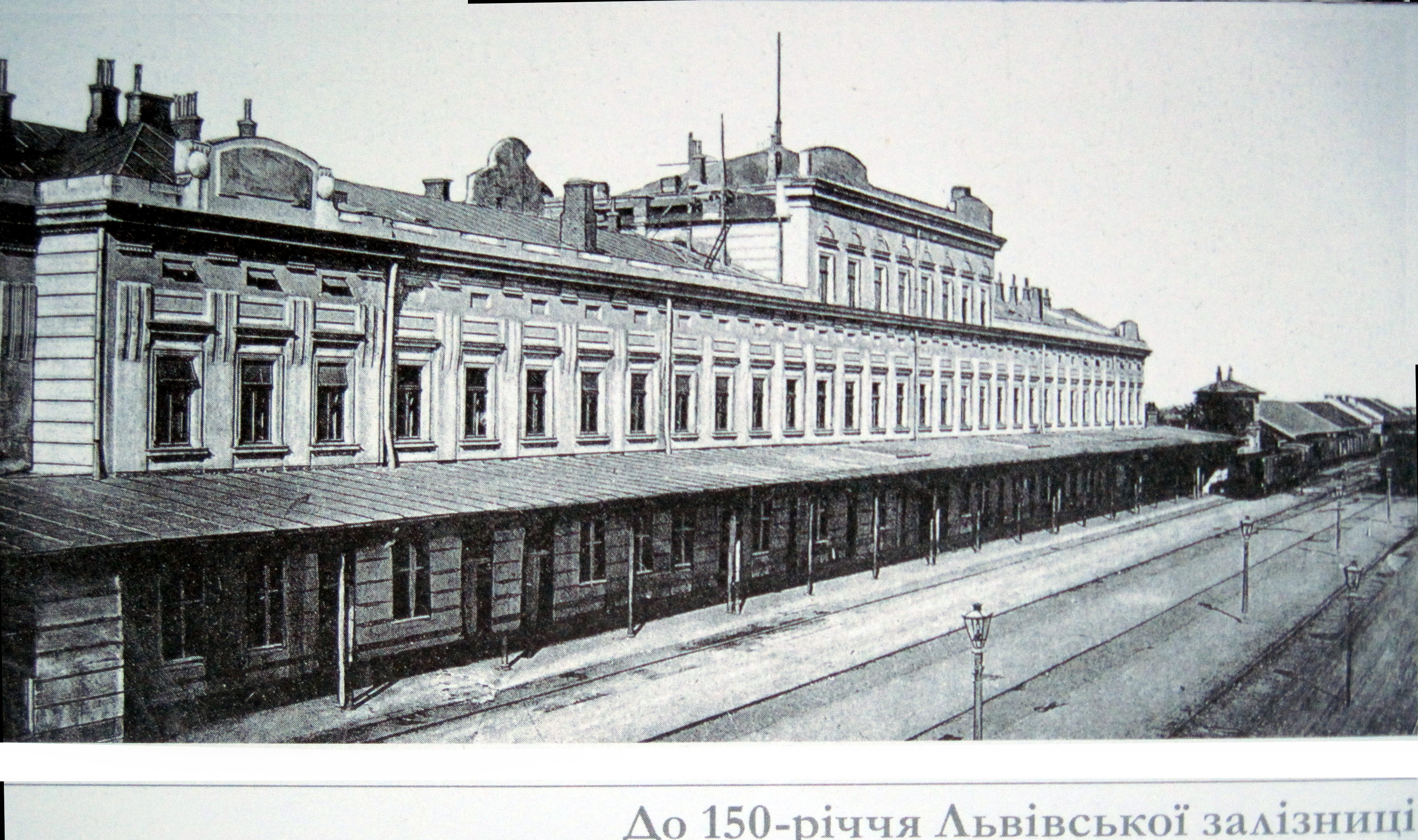 Вокзал Підволочиська перед І-ю св. війною